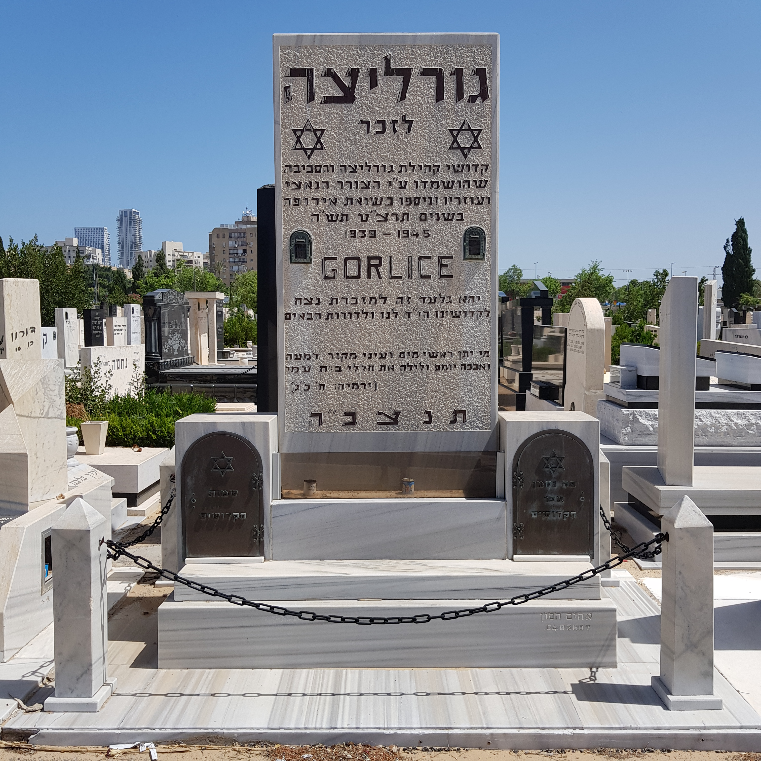 מצבת זיכרון לקהילת גורליצה בבית העלמין בחולון